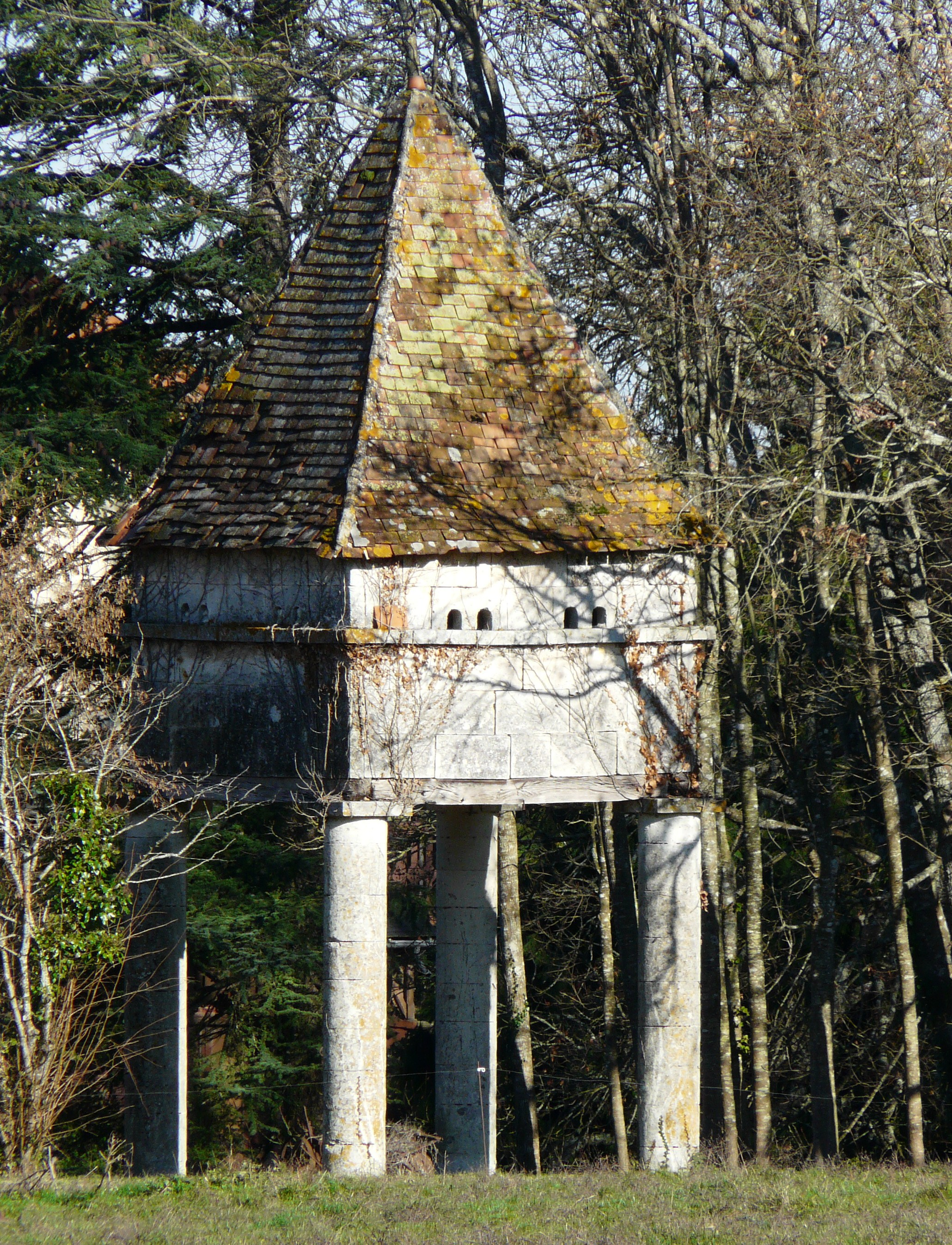 Le pigeonnier de Meycourby, Bassillac, Dordogne, France